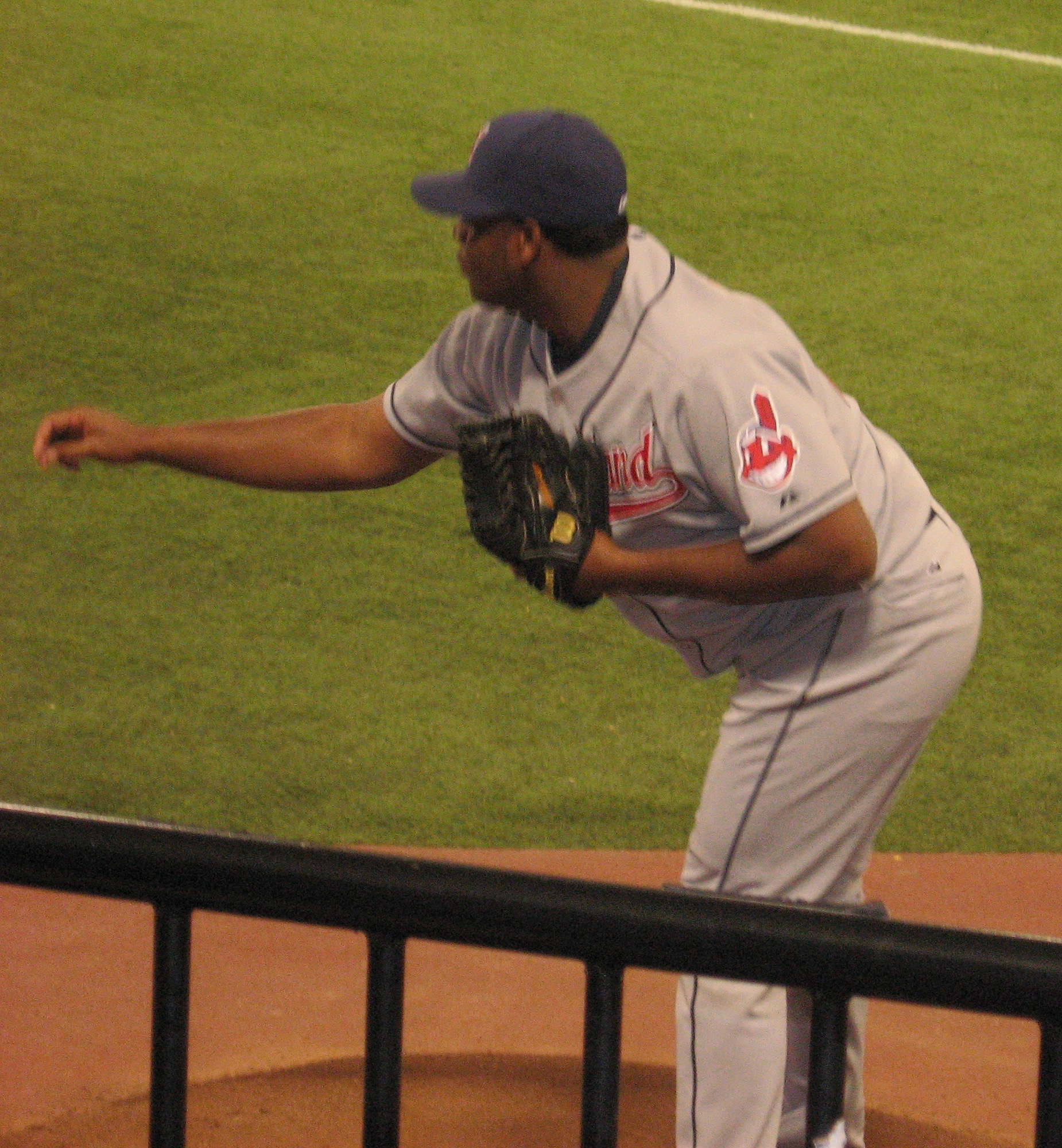 Jorge Julio